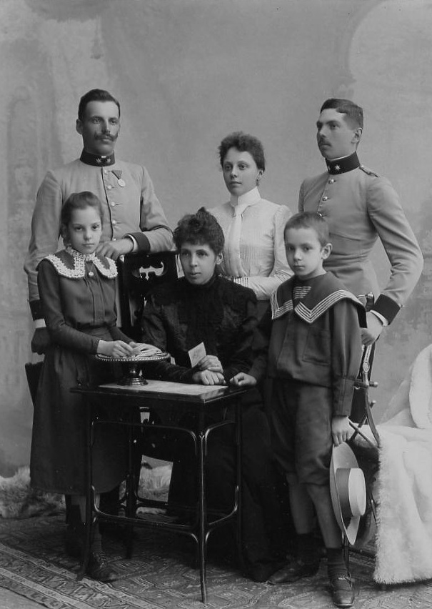 GM Eugen Bregant als Leutnant im Kreis seiner Familie (links stehend) Hinweis: Lizenz gem. Angaben auf PD-OLD-100